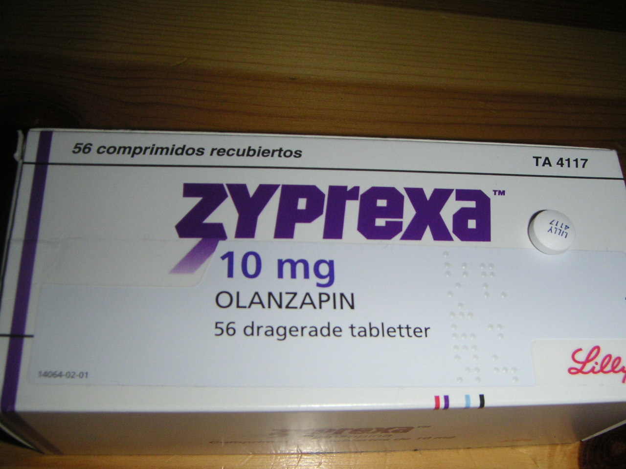 Zyprexa